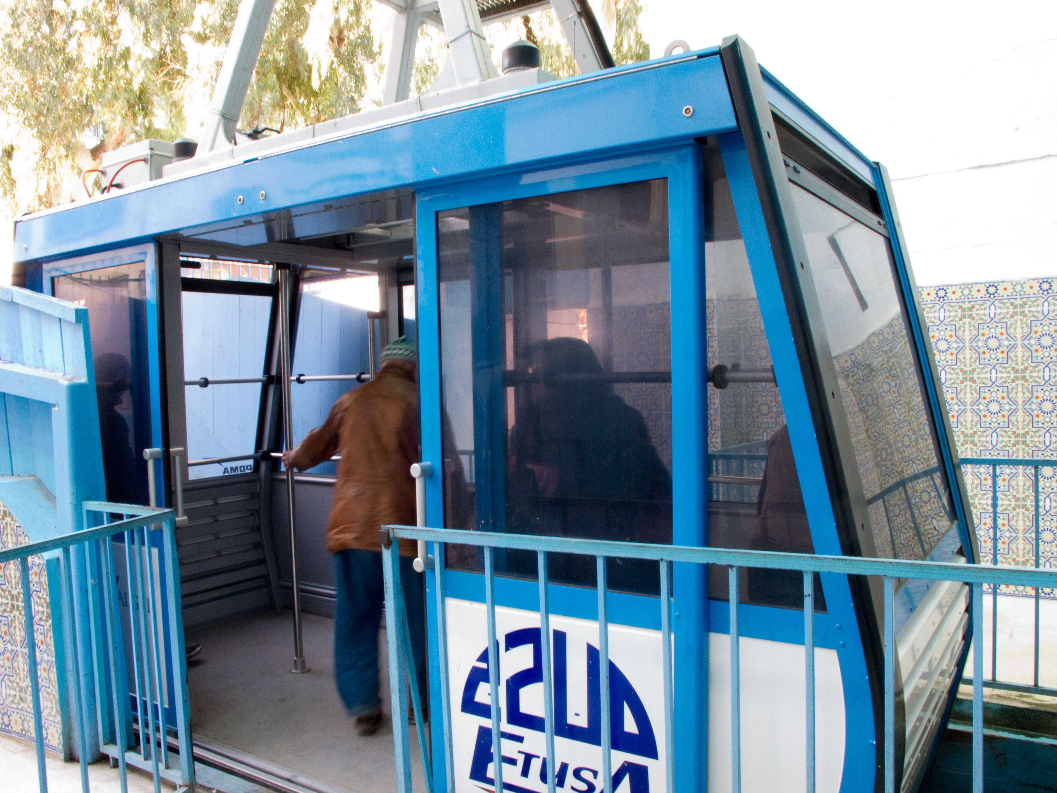 Téléphérique d'El-Madania, Alger, Algérie